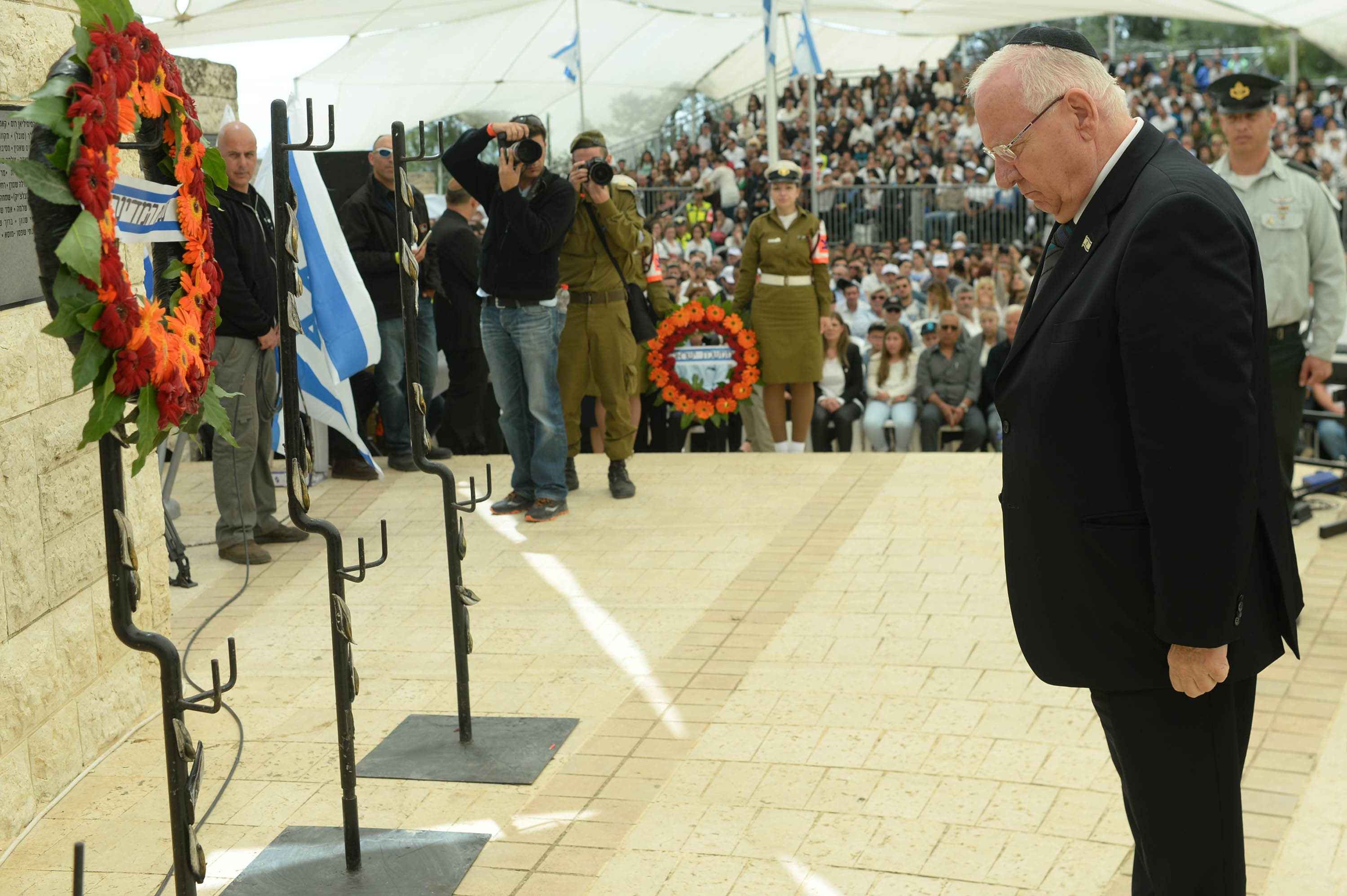 נשיא מדינת ישראל ראובן ריבלין, מניח זר בטקס האזכרה הממלכתי, ביום הזיכרון לנפגעי פעולות האיבה